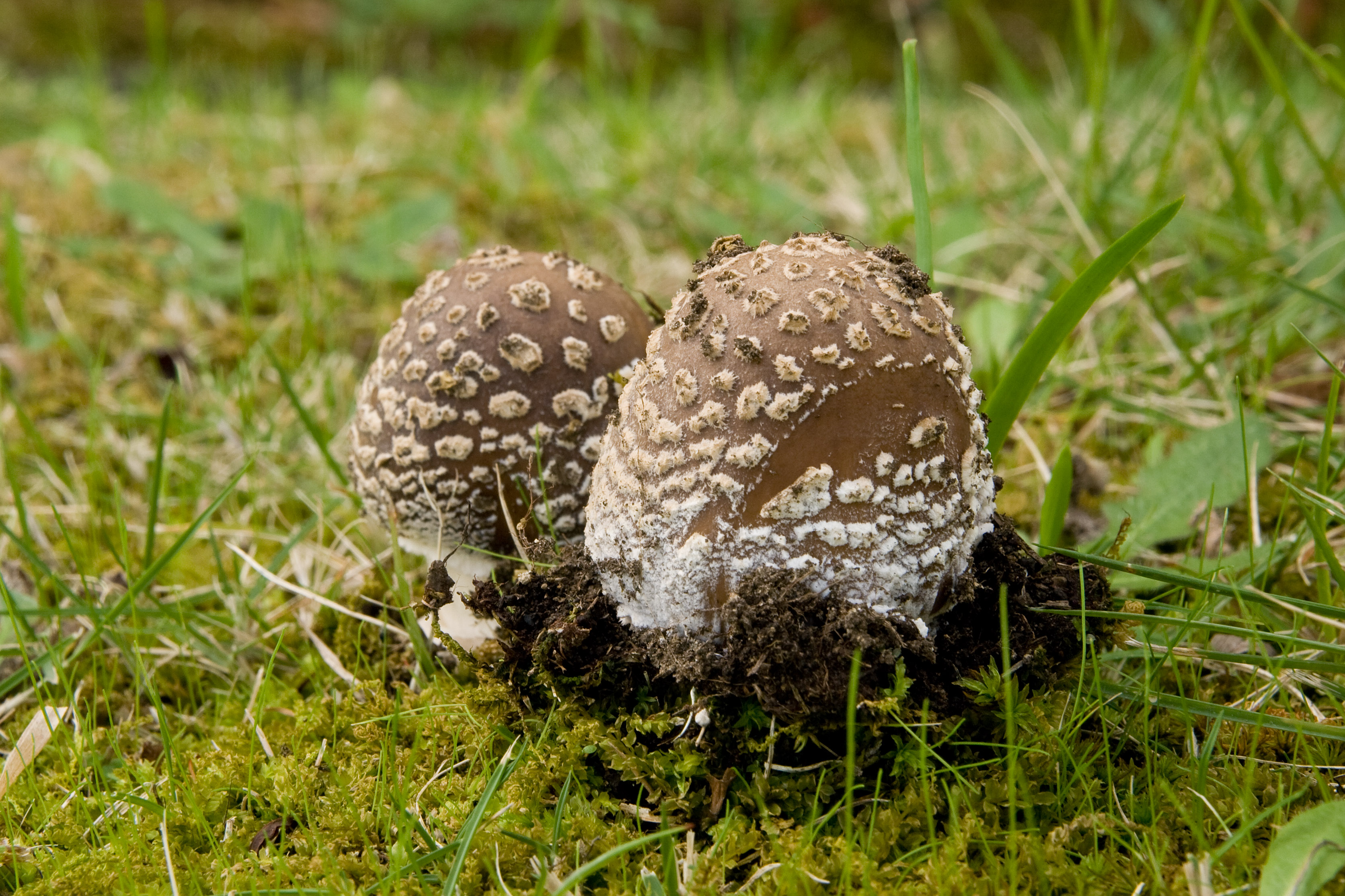 テングタケ (学名：Amanita pantherina)